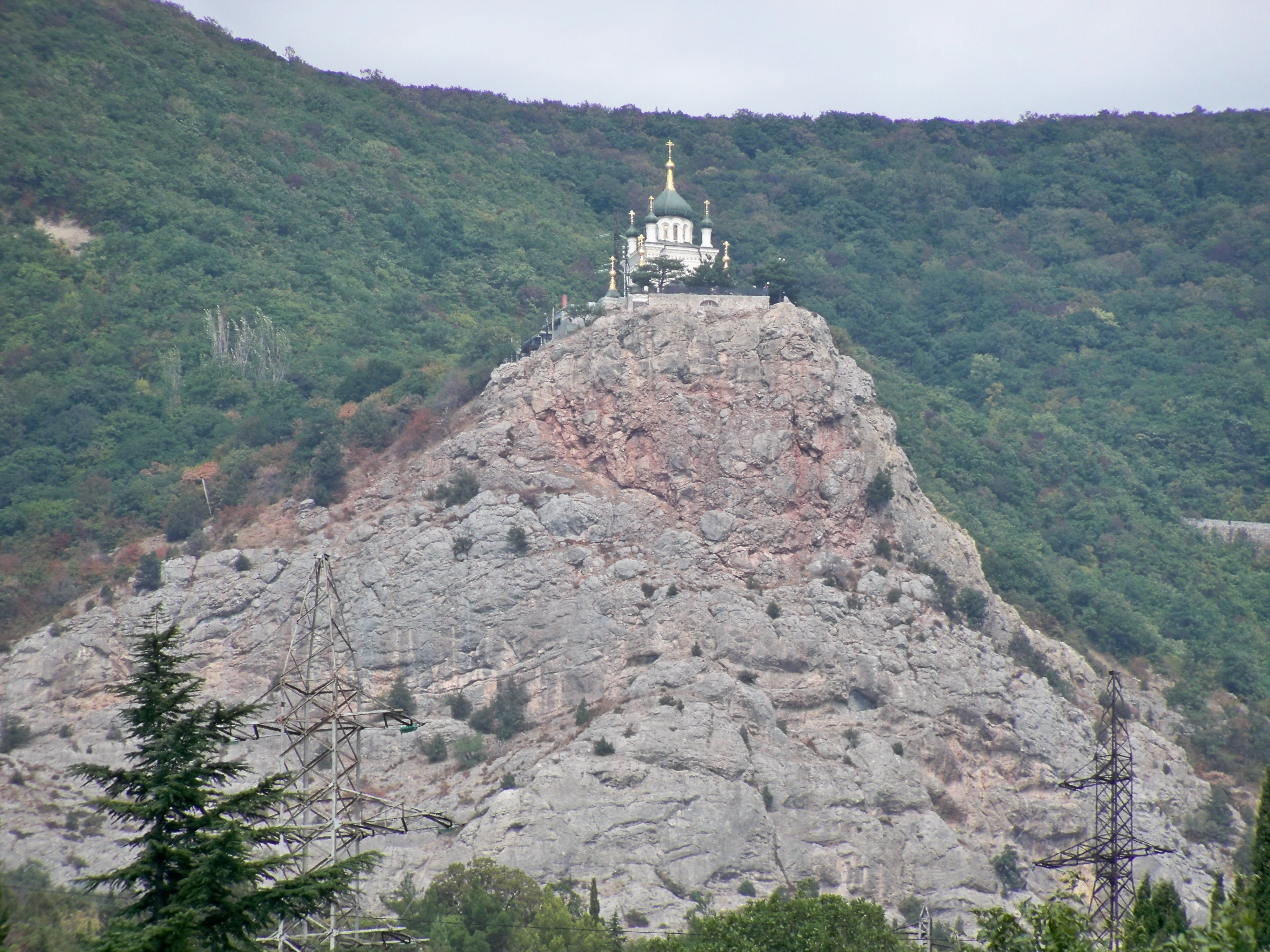 Церква Воскресіння Христового, Форос, с. Форос, поблизу перевалу Байдарські ворота